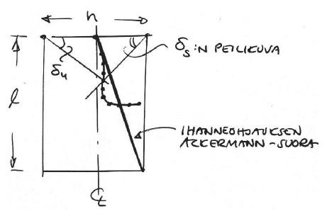 Ackermann-ehtoon liittyvä ohjauksen virhekäyrä.